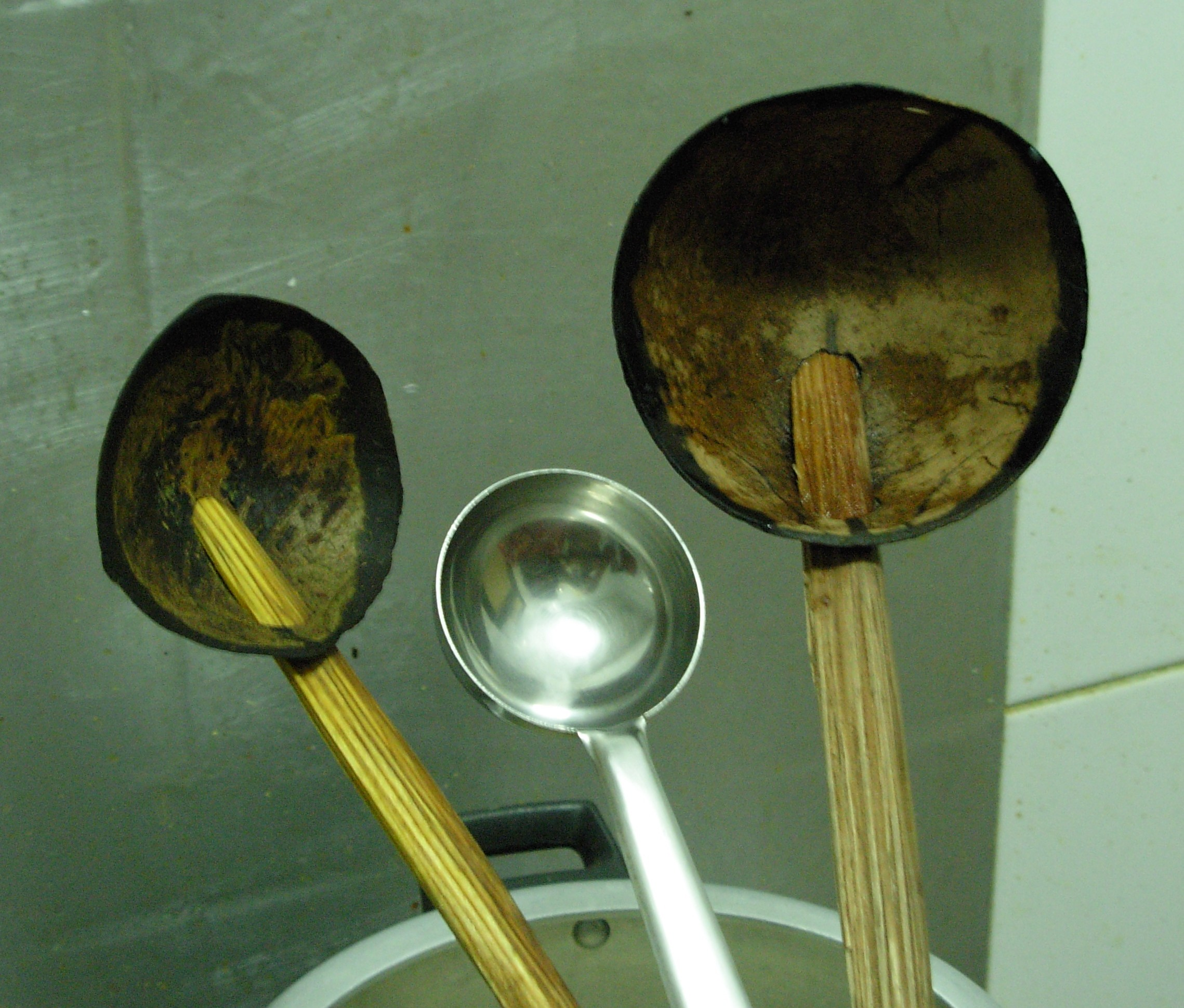 സ്റ്റീൽ തവിക്ക് ചുറ്റുമിരിക്കുന്ന ചിരട്ട തവികൾ